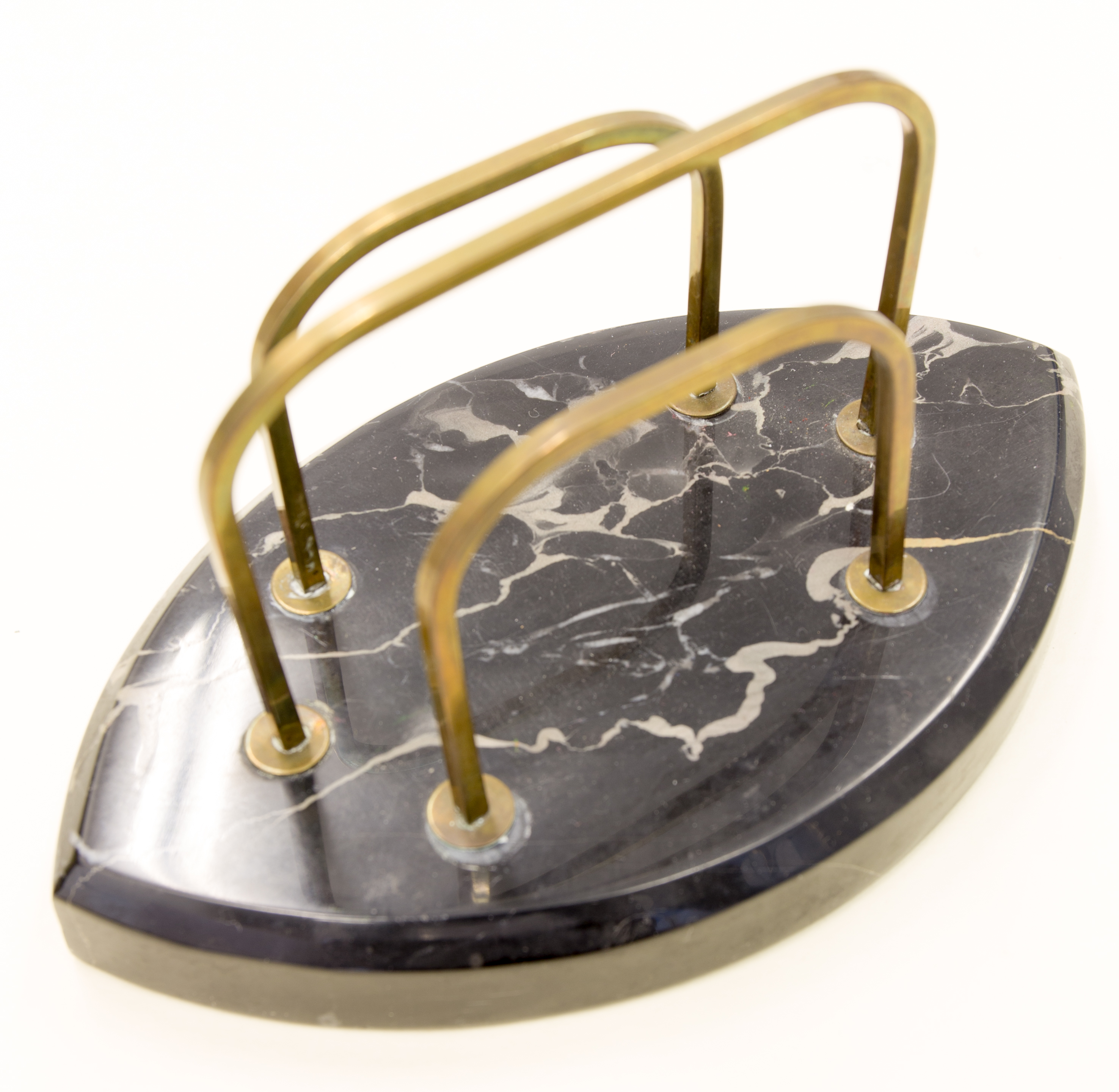 Briefhalter für den Schreibtisch Indetifikations-Nr.: N (9 A 80) 217/1992 Herstellungsort: Berlin Höhe x Breite x Tiefe: 9 x 17 x 10 cm Ausgabe: Marmor, Messing, poliert Zustand: gebraucht Beschreibung: Schwarzer, ovaler Marmorblock mit Zuspitzung an den Schmalseiten und drei an der Oberseite angeschraubten Messingbügeln.